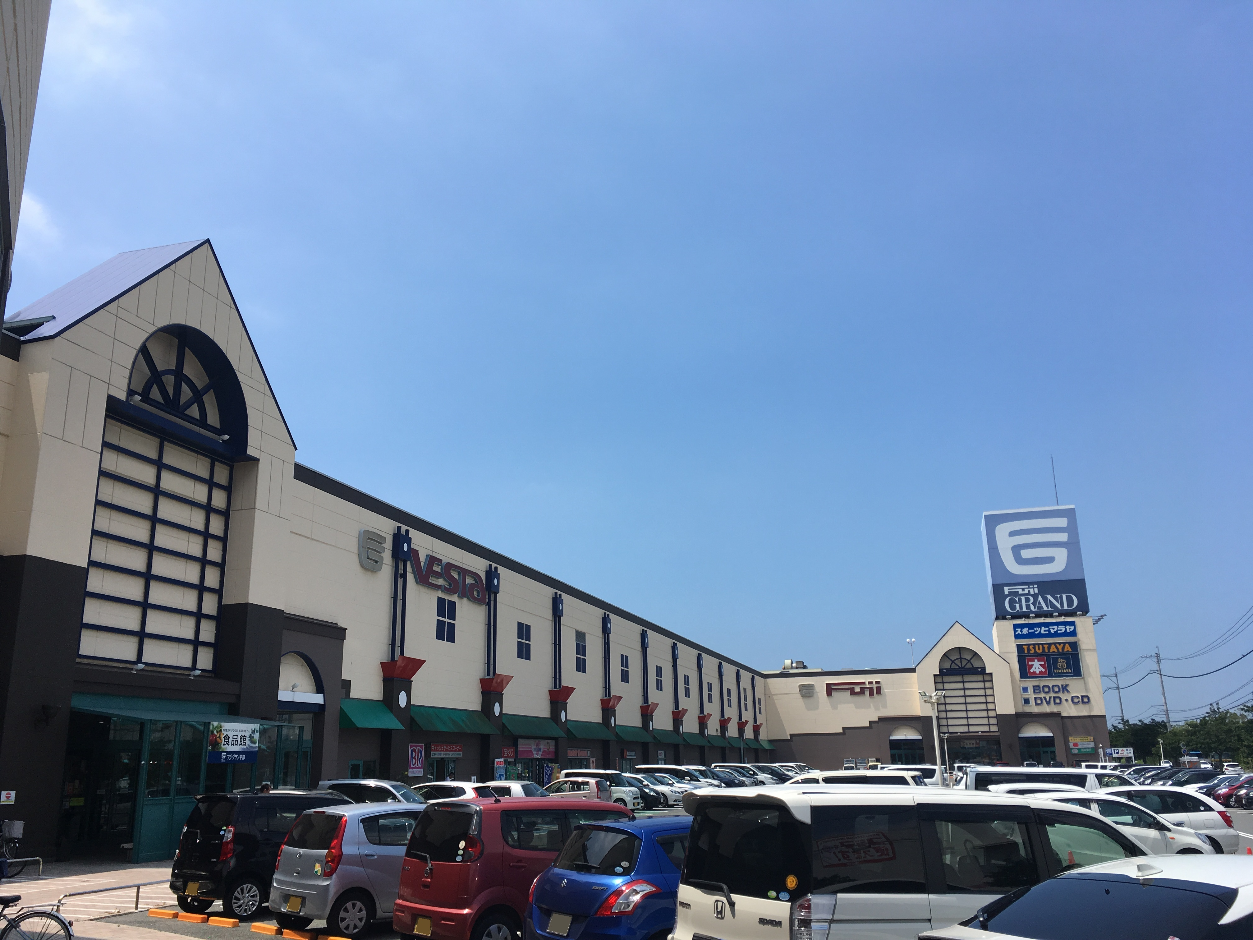 フジグラン宇部専門店街・生活館方向